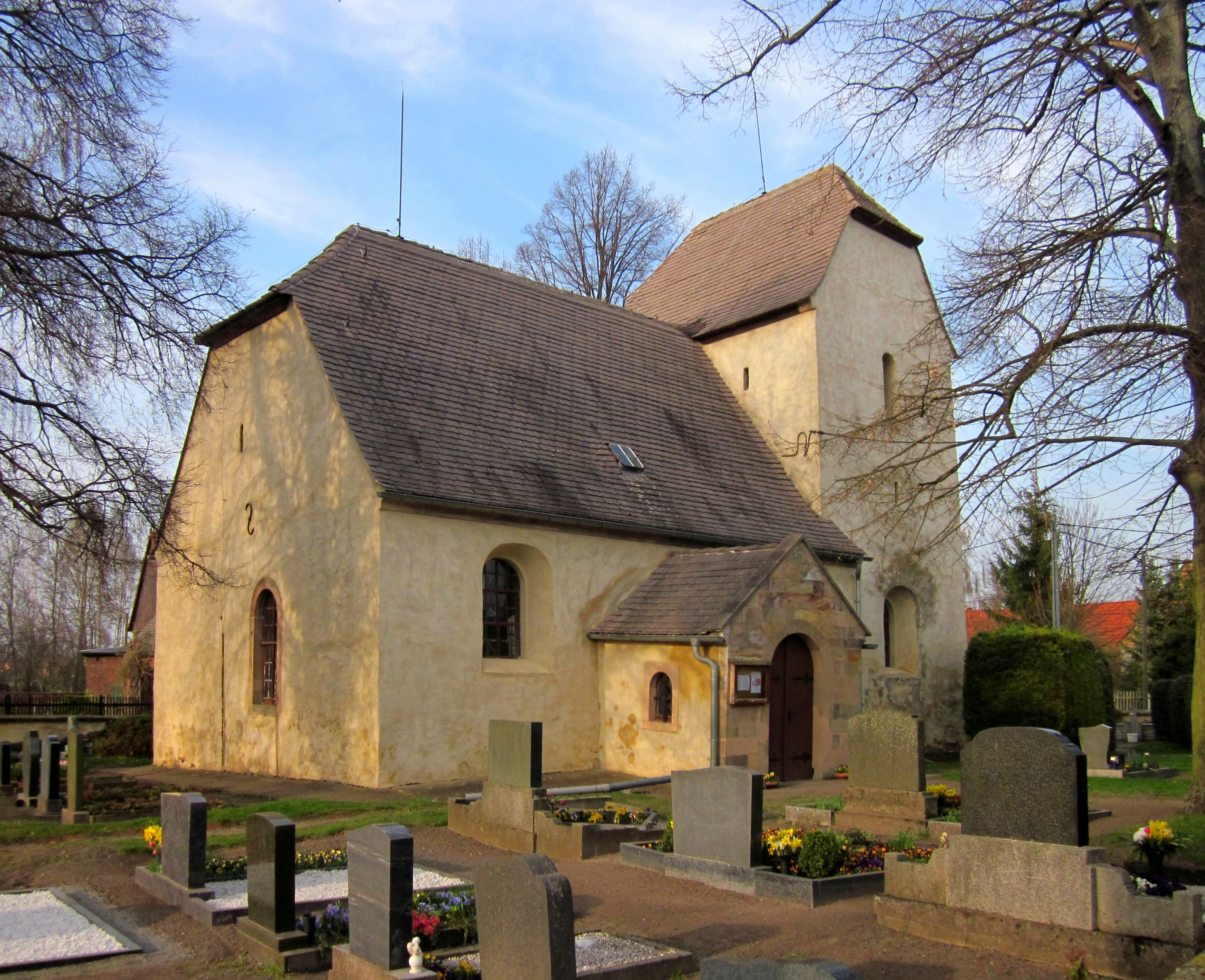 Kirche Bischdorf in der Bad Lauchstädter Ortschaft Milzau